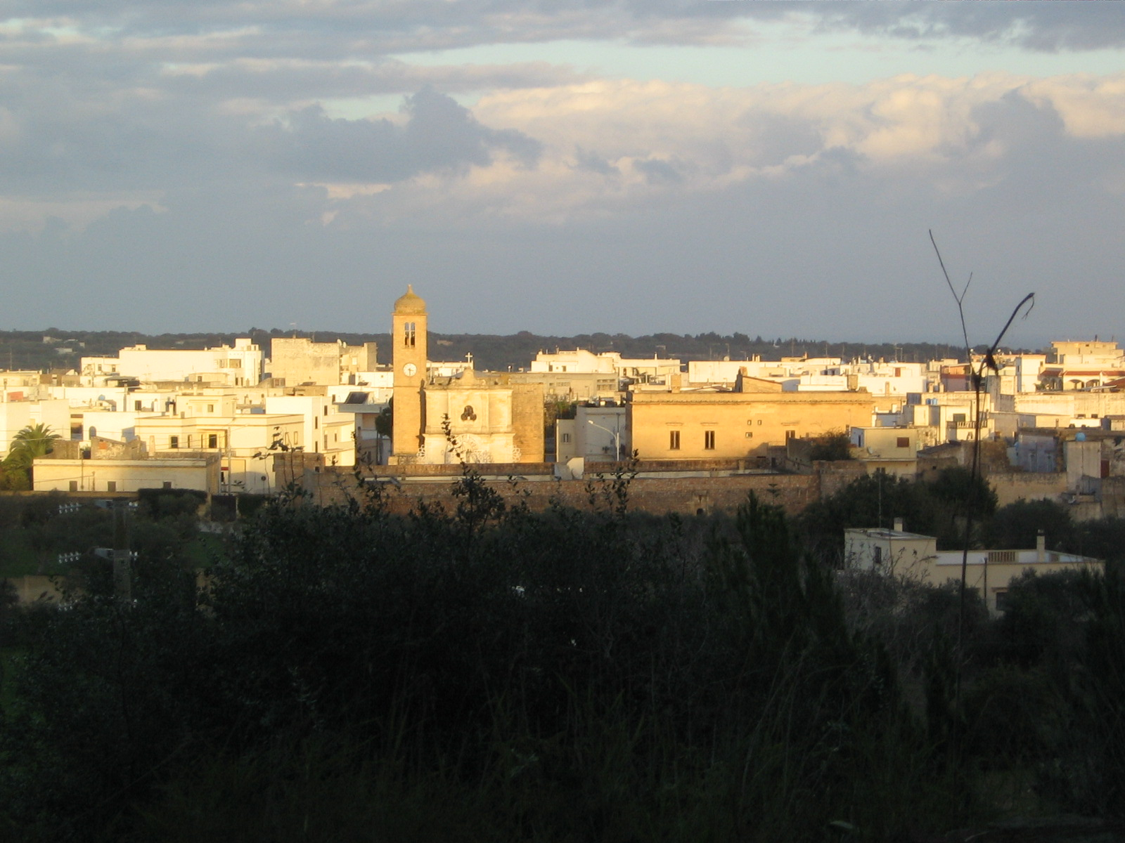 Categoria:Immagini esclusivamente in GNU FDL